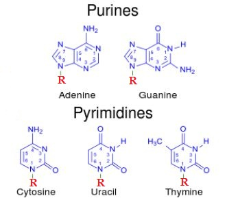 Représentation des différents types de bases azotées